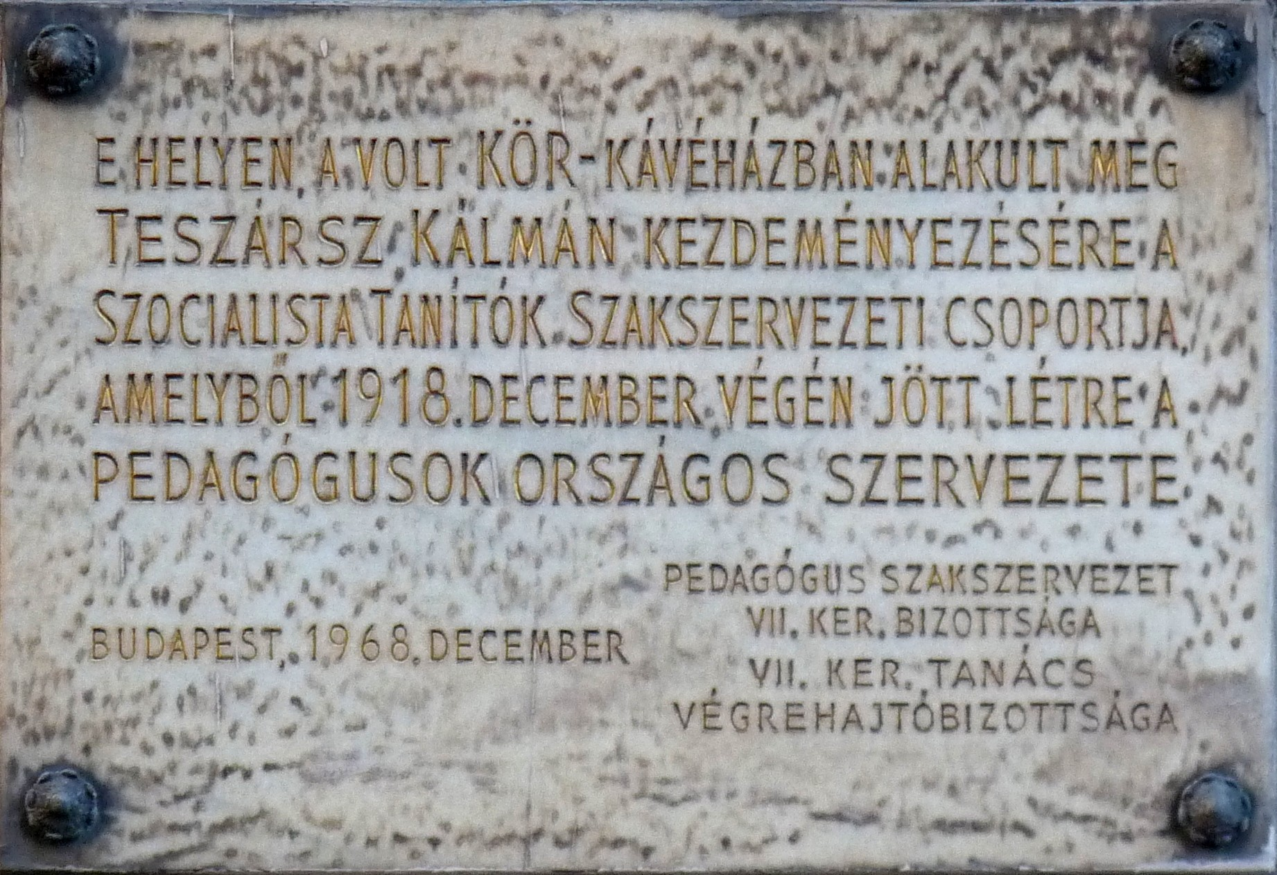 A Pedagógusok Országos Szervezete 1918. december 30-án történt megalakulásának emléktáblája a hajdani Kör kávéház Dob utcai falán (Dob utca 62.). Budapest, VII. ker. Erzsébet körút 44.